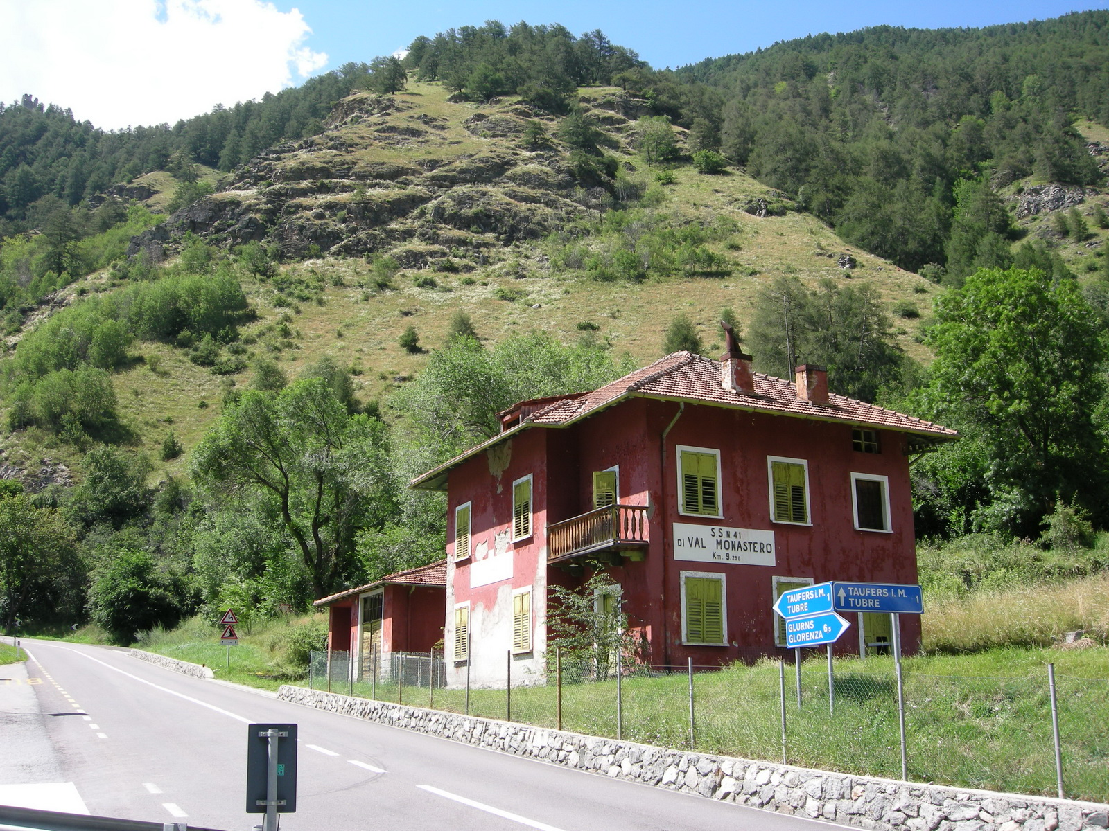 Casa cantoniera sulla SS41 della Val Monastero. Località Rivaira, Tubre, provincia di Bolzano